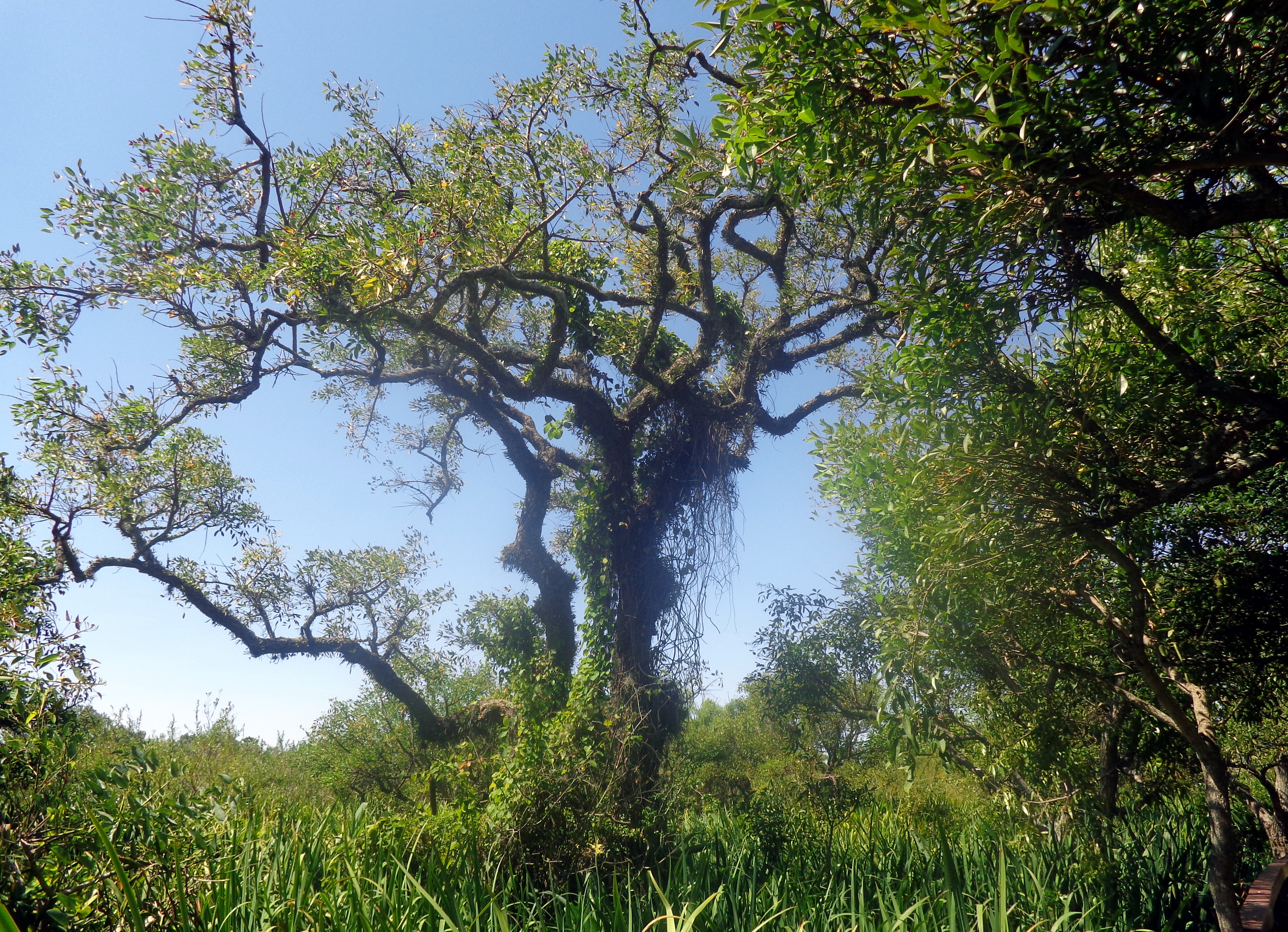 En la costa del Río de la Plata de Acassuso, en el partido de San Isidro, sobre el camino de la Ribera, entre la calle Vicente López y las calles Planes y Almafuerte, a la altura de la Avenida del Libertador 15400.